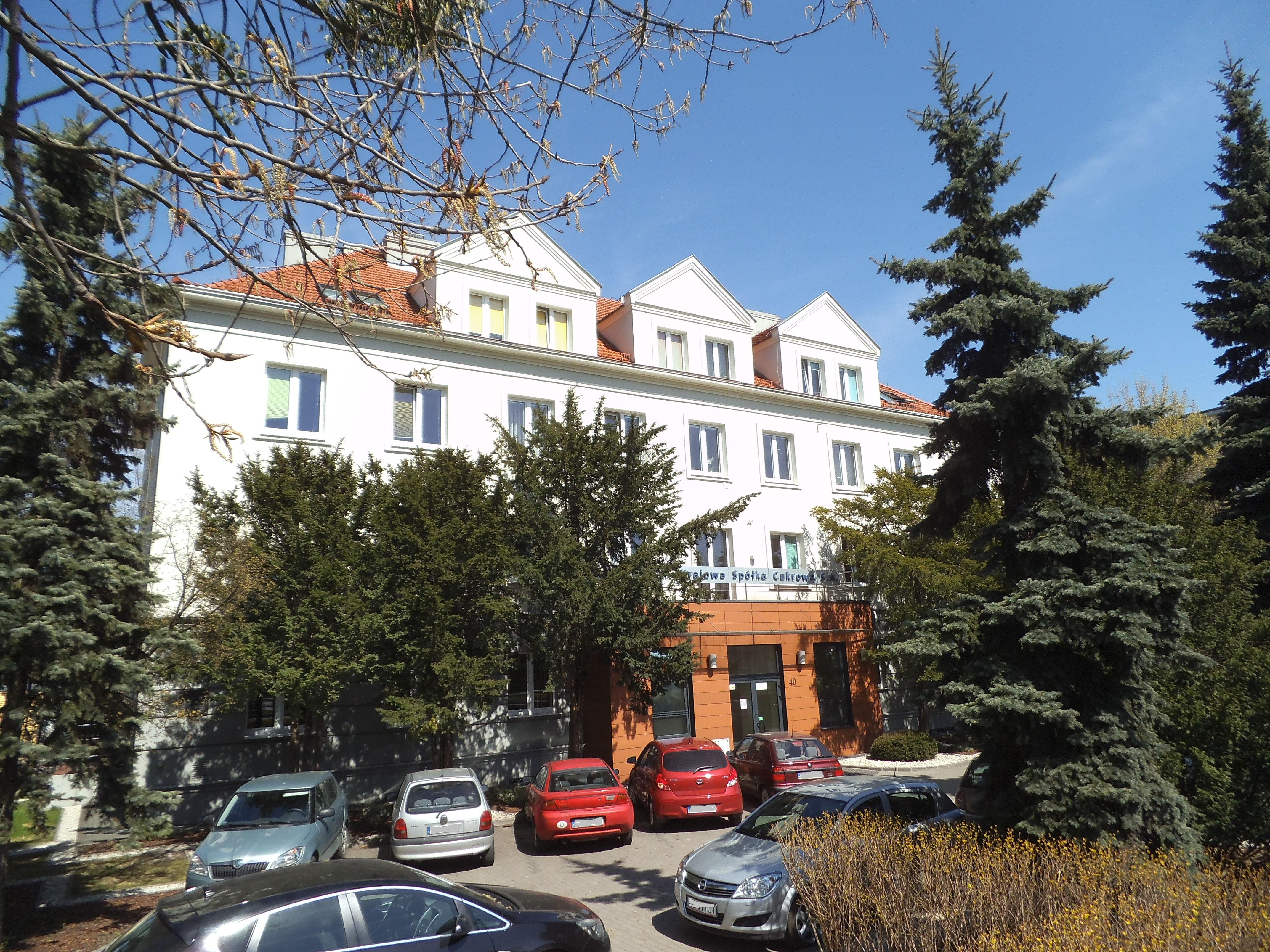 Krajowa Spółka Cukrowa w Toruniu